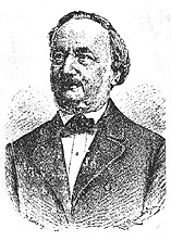 Портрет немецкого композитора Августа Готтфрида Риттера